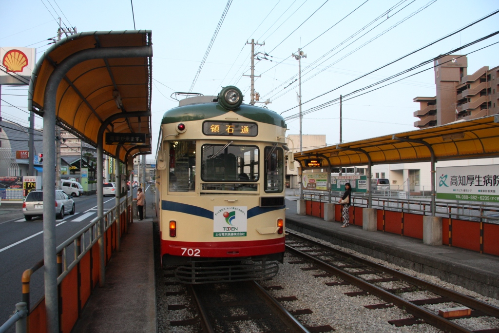 西高須停留場に停車中の700形電車